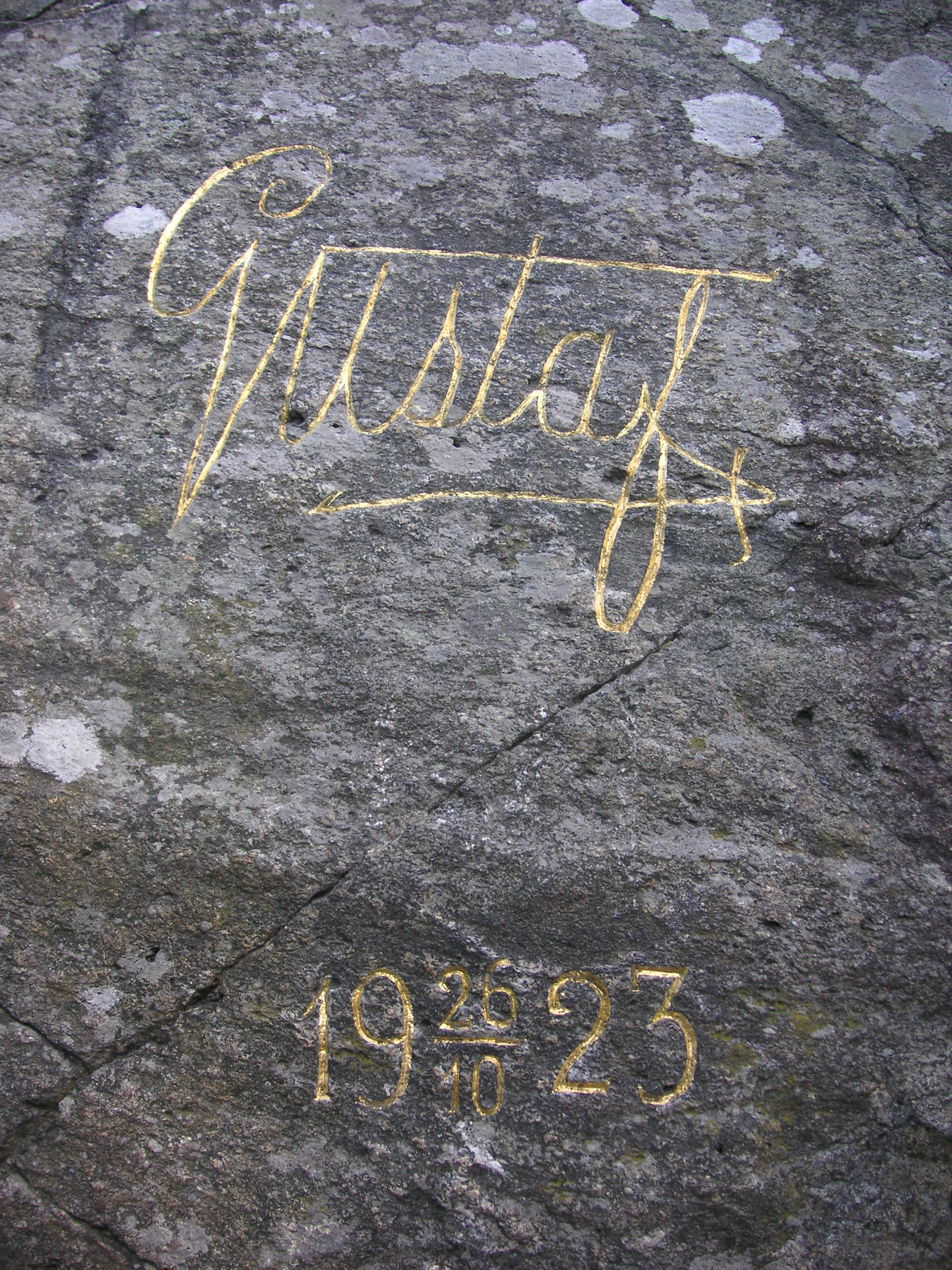 Gustaf V:s namnteckning på en stenhäll vid Brunnsvikens södra strand, Frösundavik